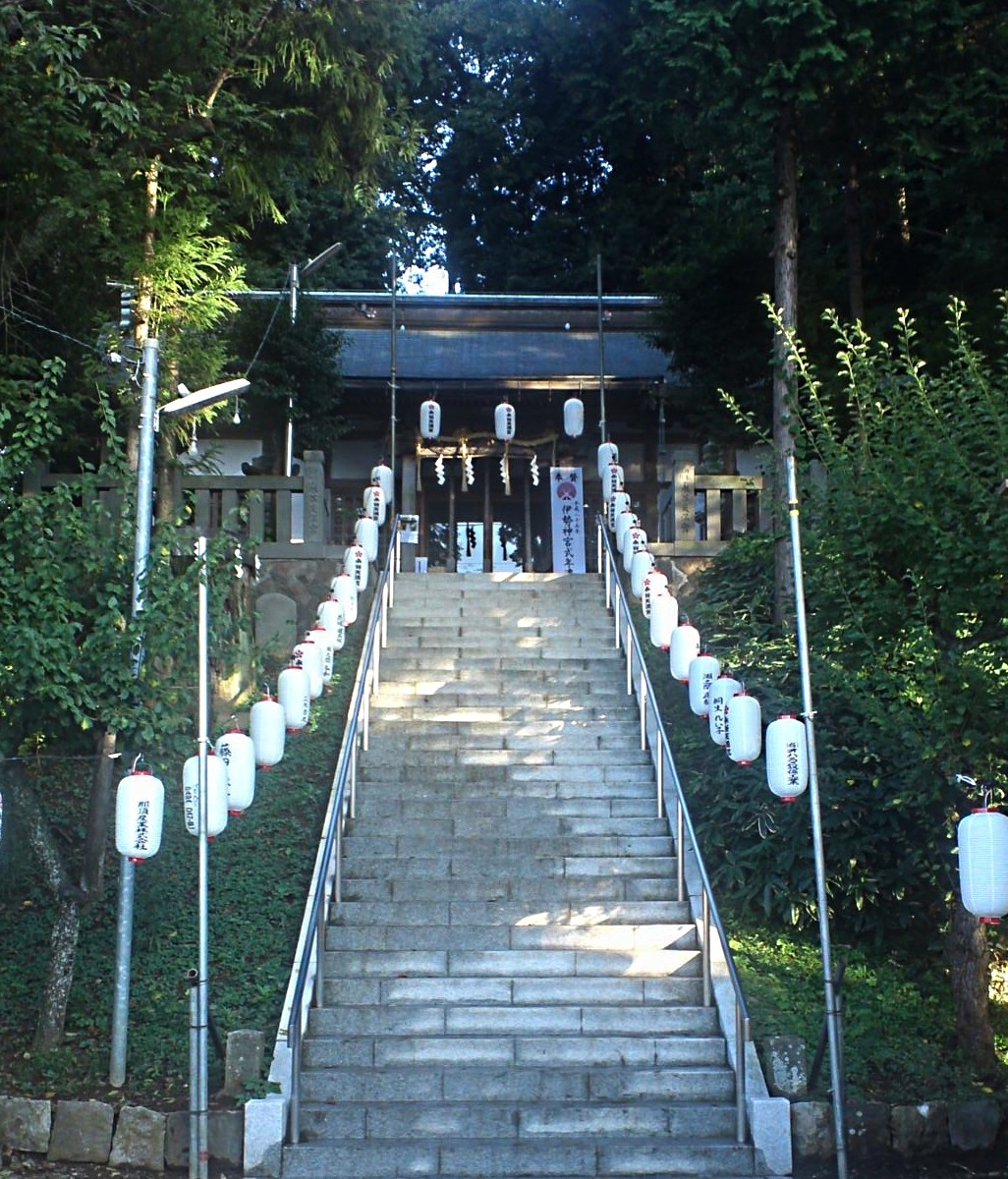 永谷天満宮（神奈川県横浜市）